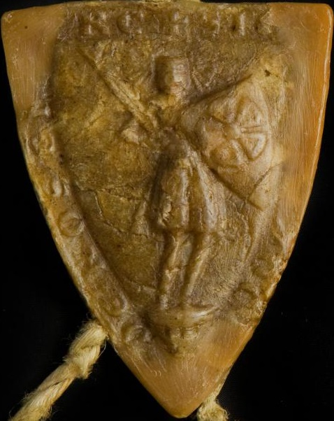 Pecet Voka I. z Rožmberka